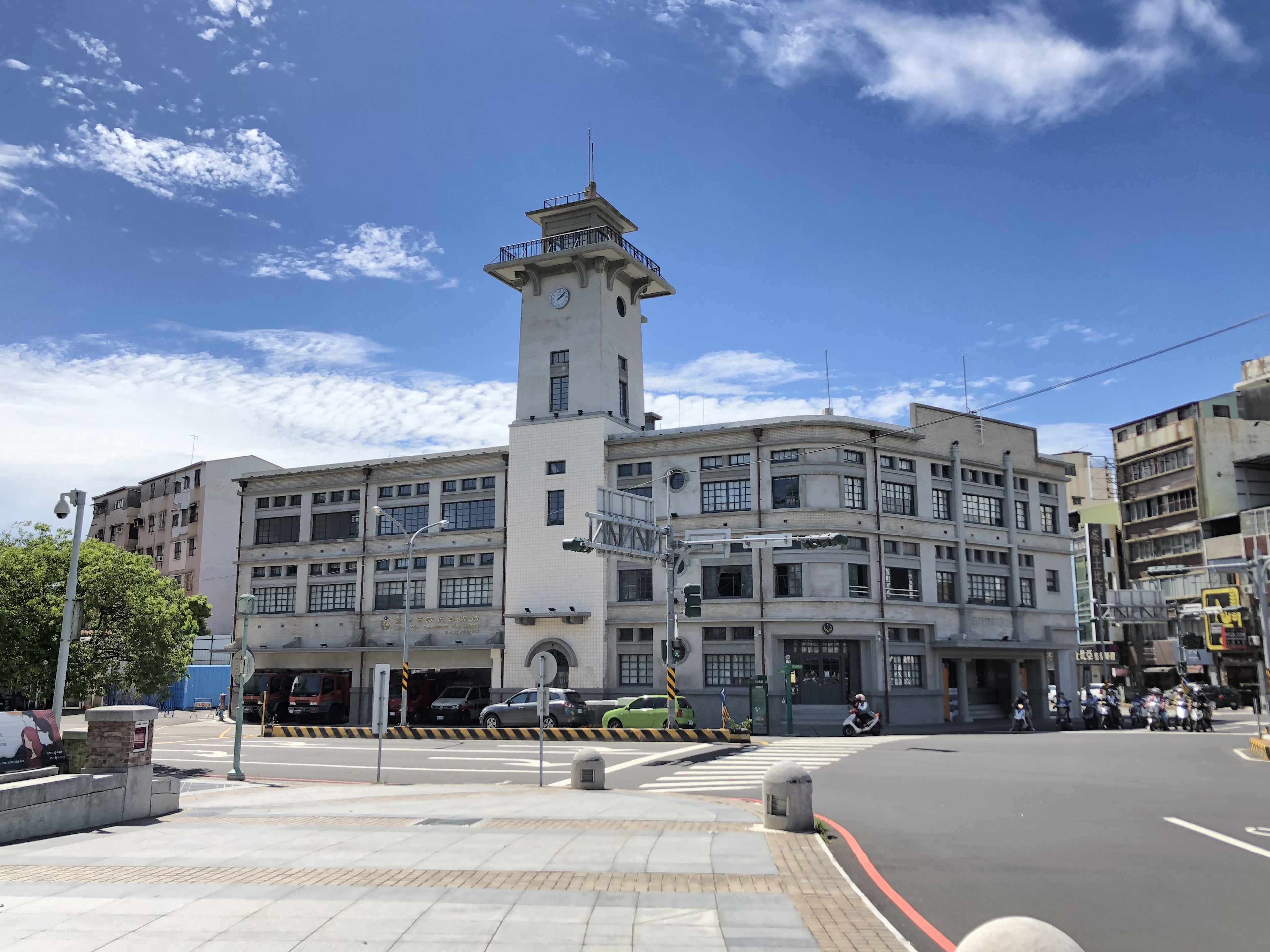 台南合同廳舍，2019年六月。